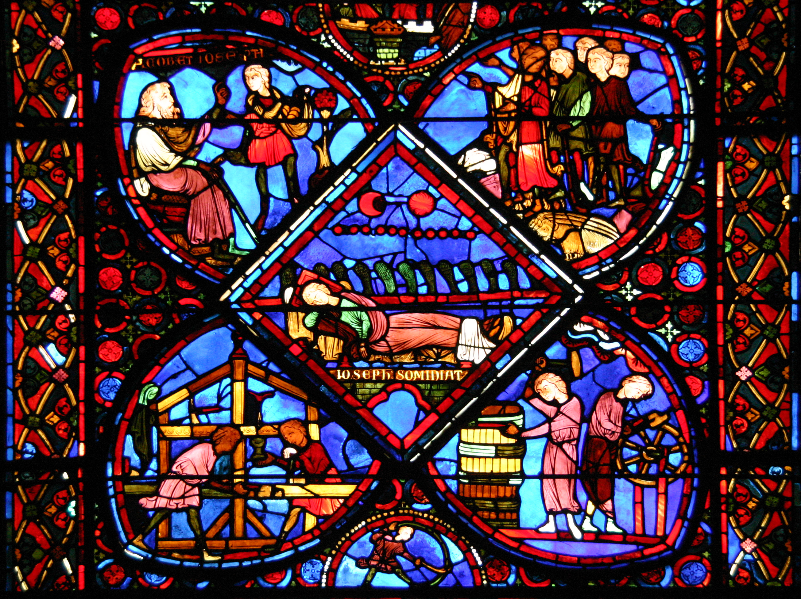 Fenster der Kathedrale Saint-Étienne in Bourges